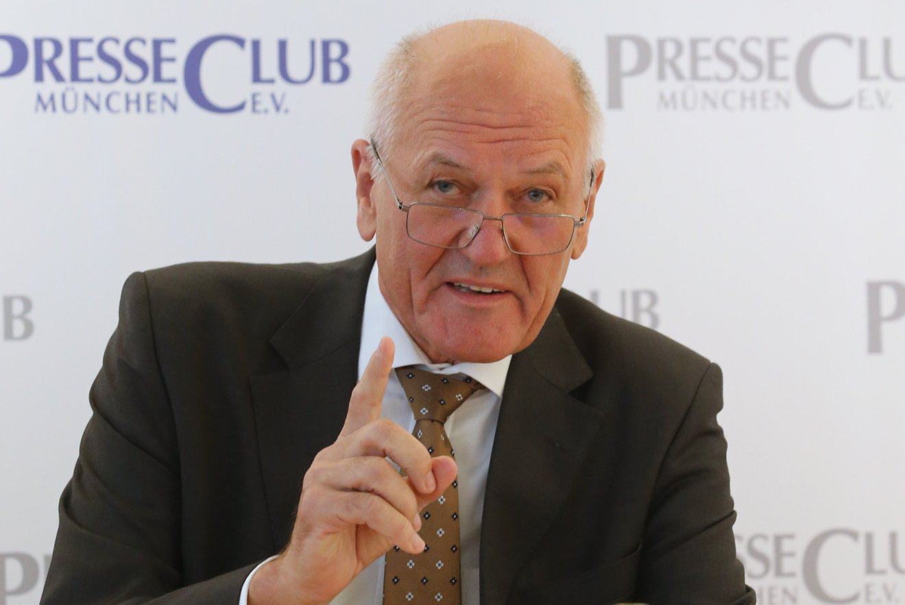 Manfred Nüssel, deutscher Agraringenieur, Politiker (CSU) und Aufsichtsratsvorsitzender der BayWa AG, außerdem Präsident des Deutschen Raiffeisenverbandes. Hier während eines Pressegesprächs ("Bayerischer Milchgipfel") am 22.09.2016 im Internationalen Münchner PresseClub. Titel des Werks: "Manfred Nüssel am 22.09.2016 in München"